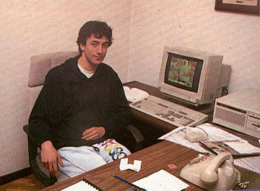 Paco Menendez en el centro de desarrollo de juegos donde daba forma a sus majestuosos programas, como fred, sir fred o la abadía del crimen